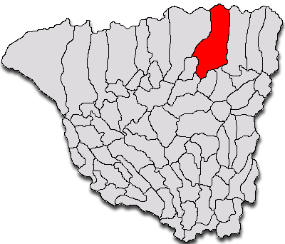 Categorie:Hărţi ale judeţului Gorj